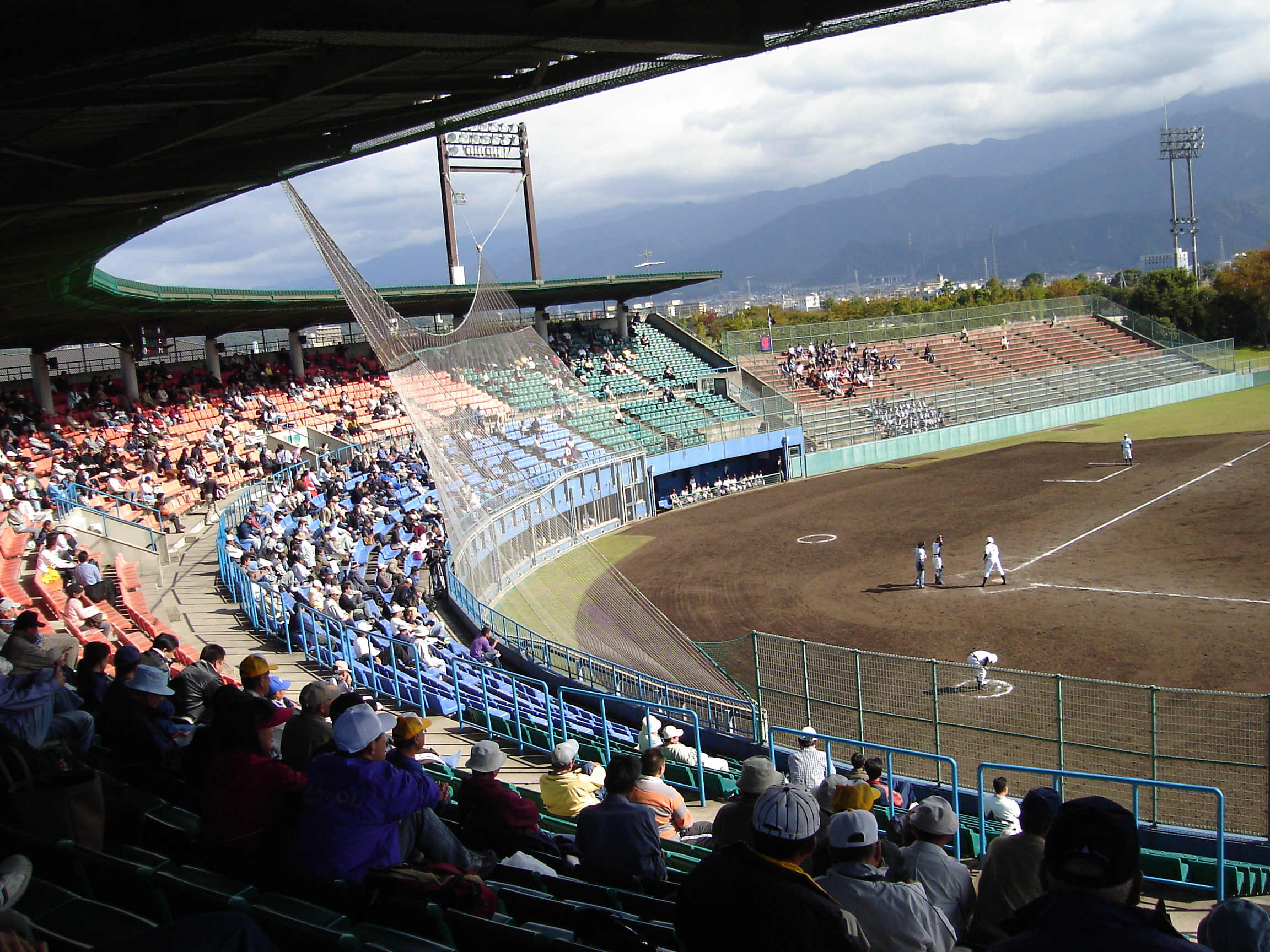 西条市ひうち球場。 - 日本国愛媛県西条市にある野球場。